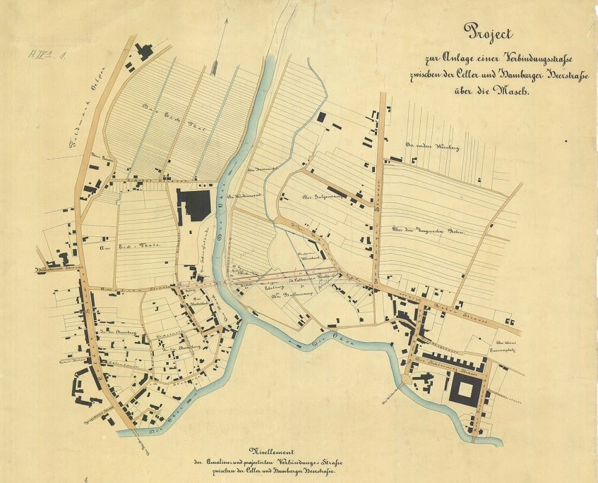 Anlage nördliche Ringstraße